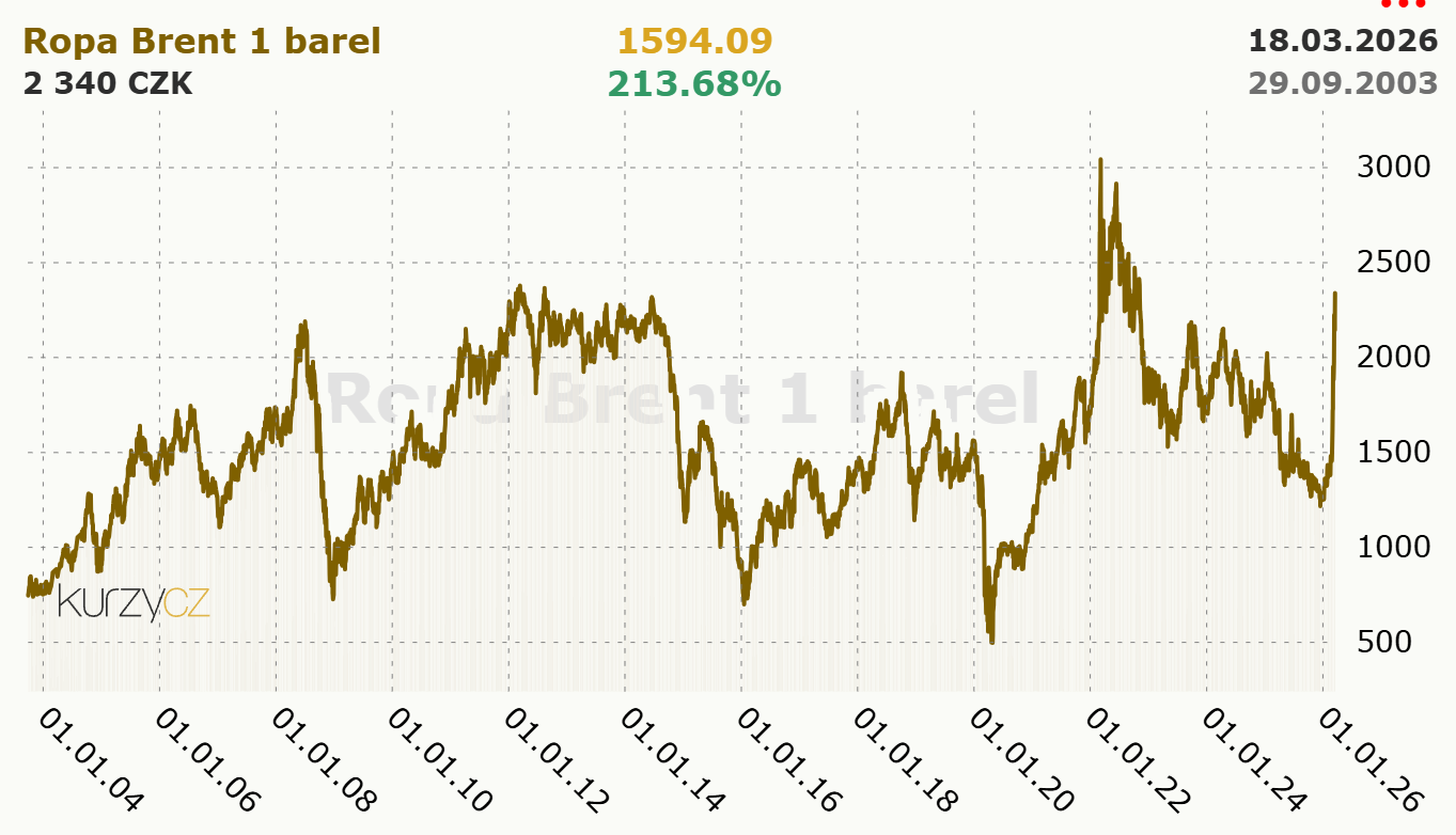 Ropa - Cena komodity.